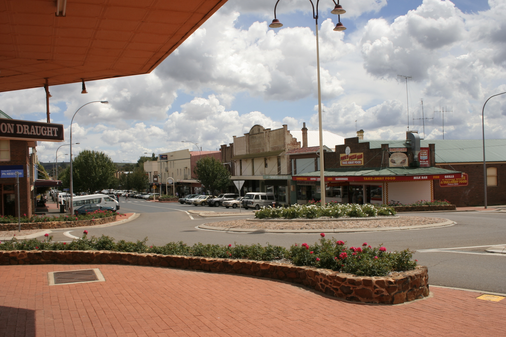 Crookwell main street